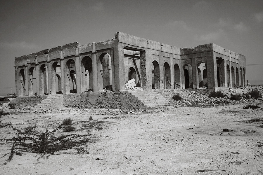 بنگله بستکی (بندرلنگه)